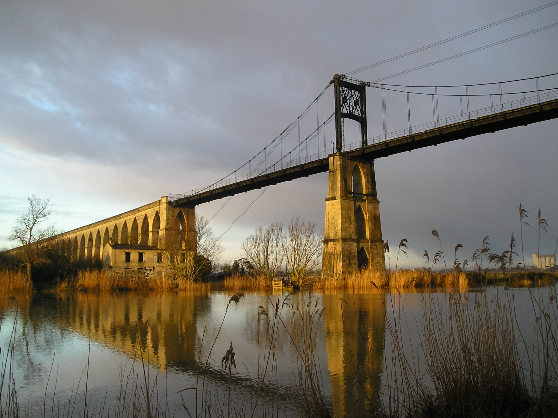 Pont de Tonnay-Charente, Charente-Maritime, France